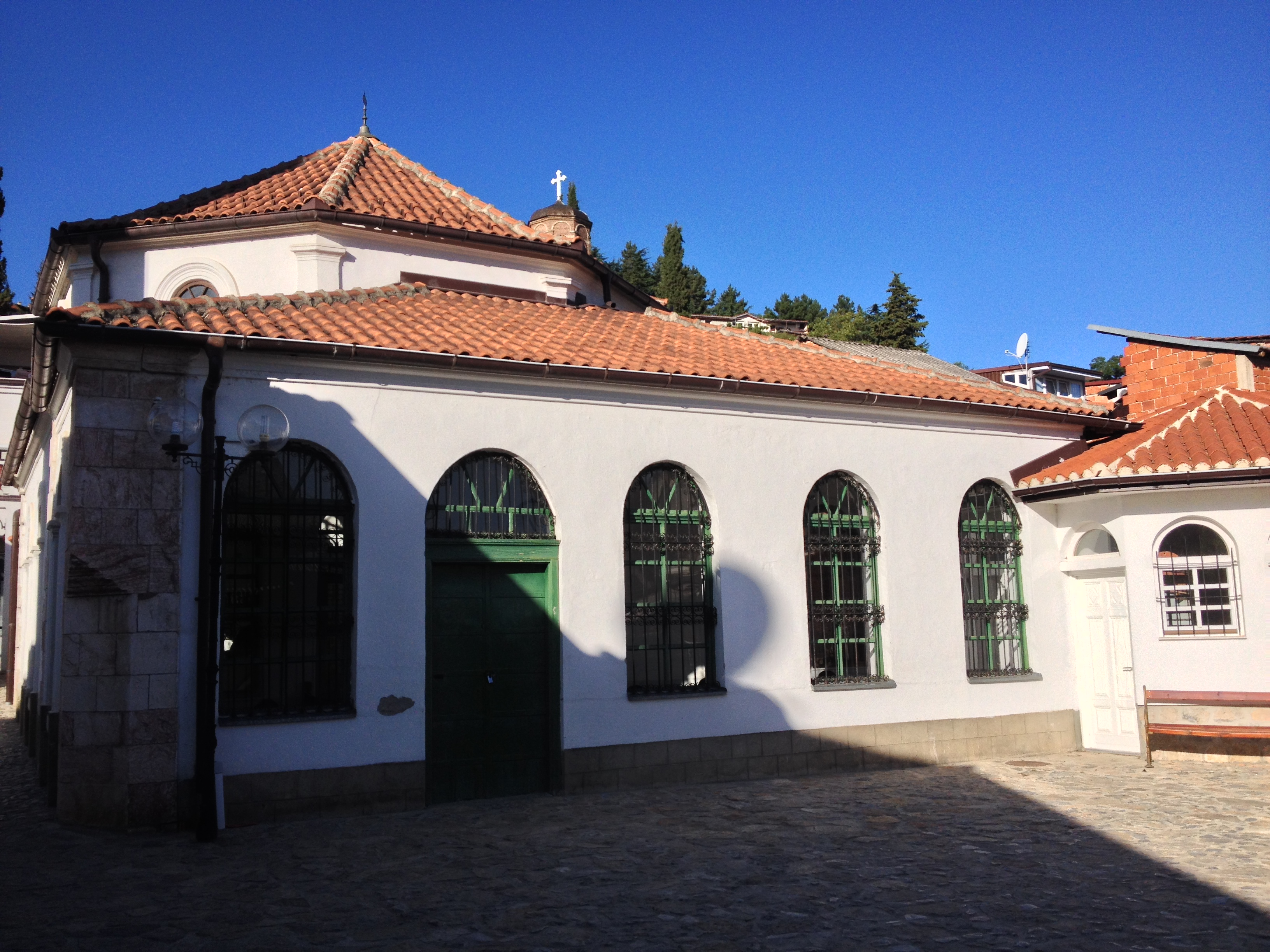 Die Zeynel-Abidin-Pascha-Moschee in Ohrid, Mazedonien